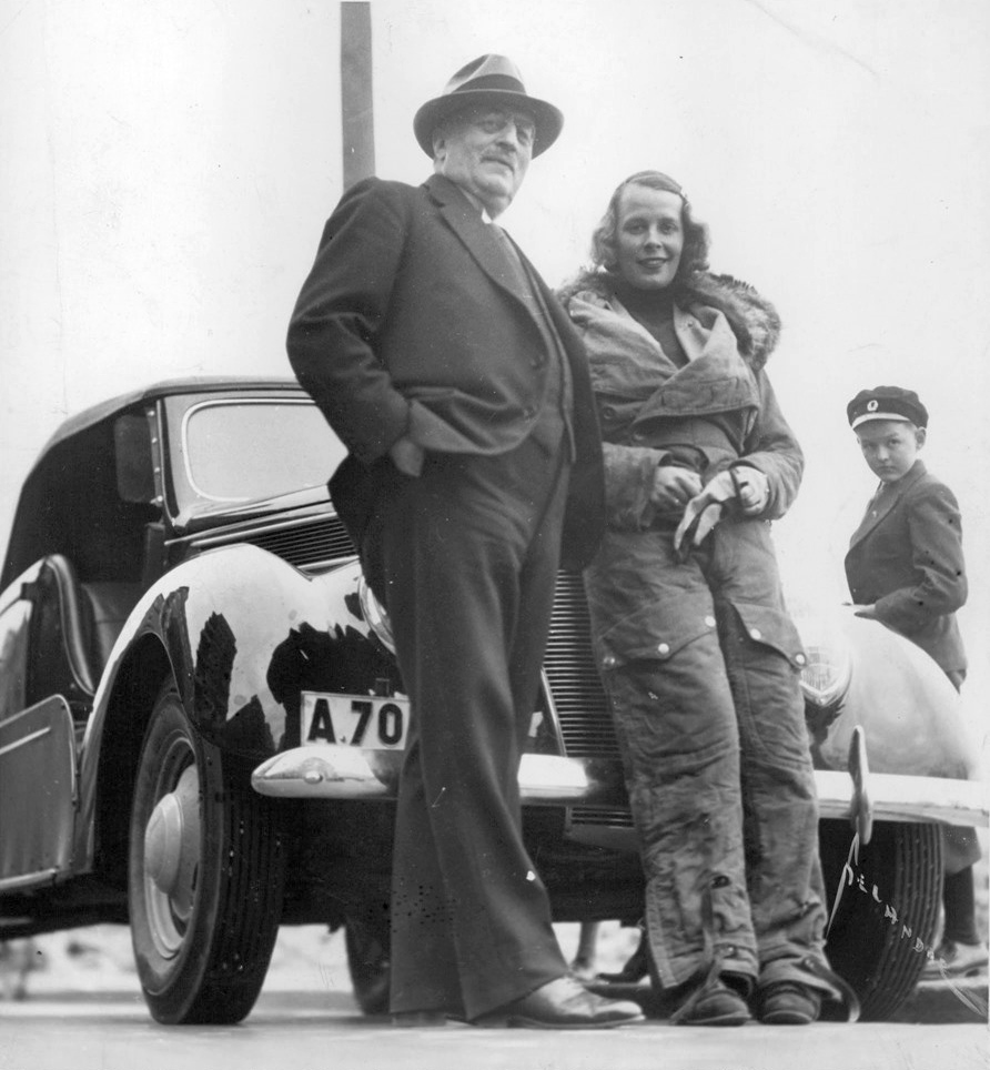 Eva Dickson och doktor Sven Hedin strax före Dicksons avfärd till Kina.